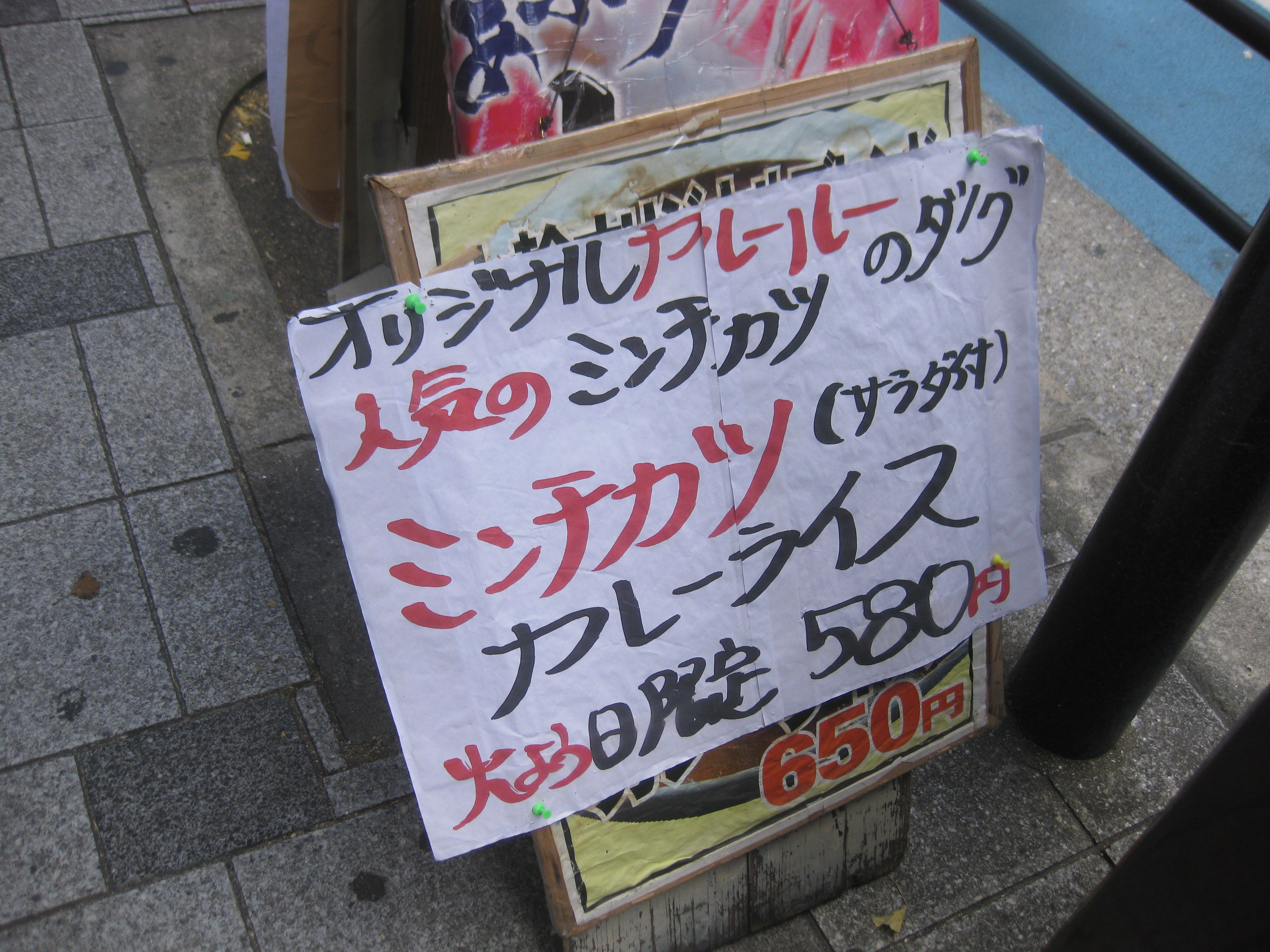 「ミンチカツ」の使用例。大阪市中央区にて。